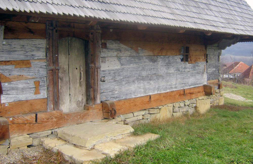 Biserica de lemn din Prodăneşti, Sălaj. Intrarea în biserică, pe latura de sud. Foto: Mihai Petriş, 12 decembrie 2007.